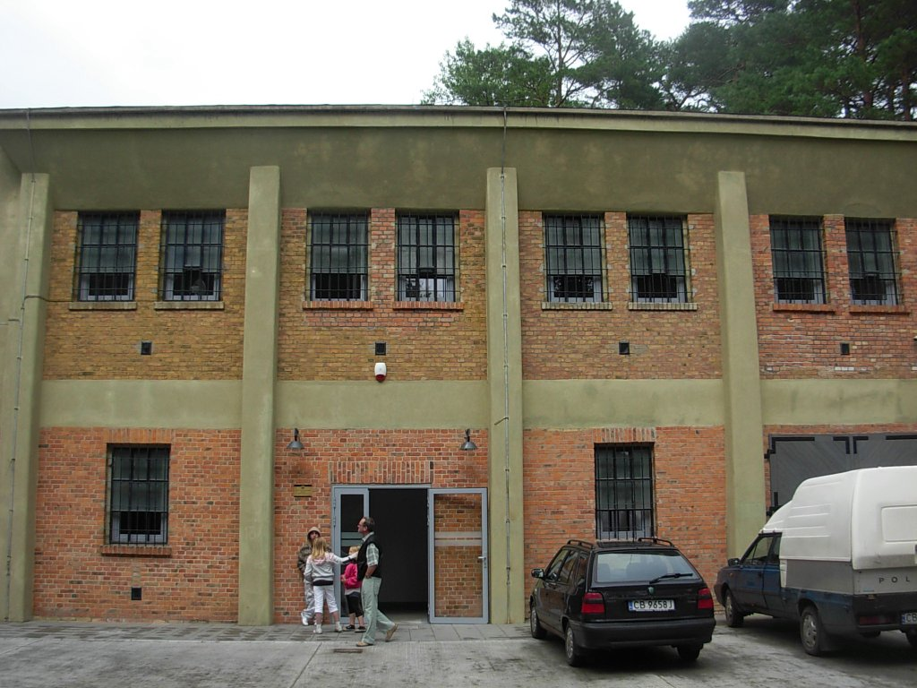 Eksploseum w Bydgoszczy. Budynek przygotowania produkcji, w którym znajdują się kasy biletowe